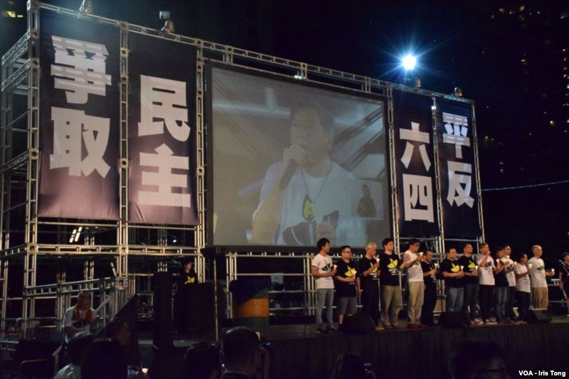 中文（香港）: 在2015年6月4日晚舉辦的維園六四燭光晚會。